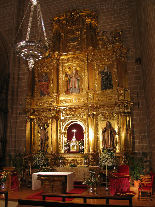 capilla